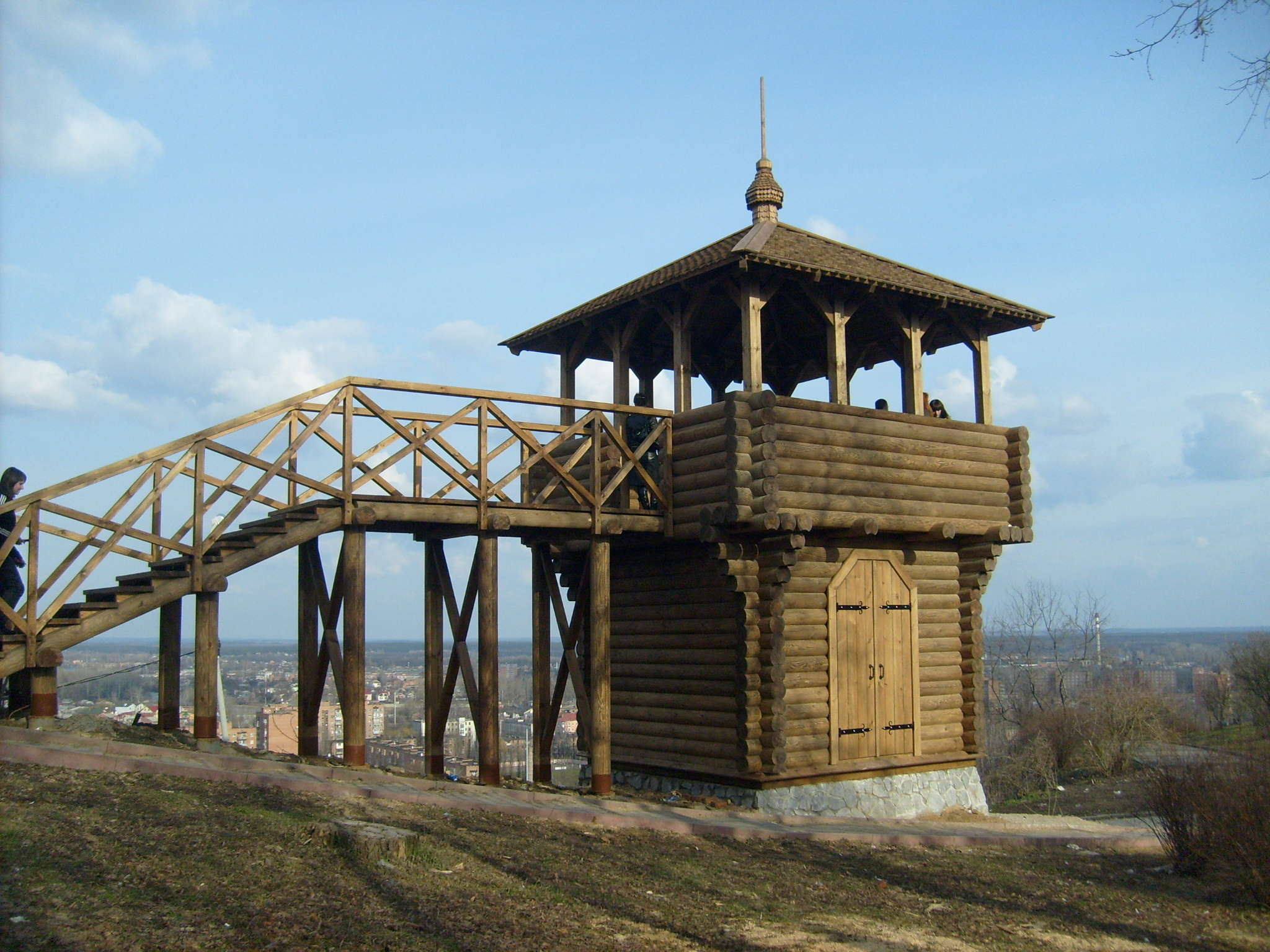 Ранньоскіфське поселення VII-V ст. до н.е. та слов’янське городище VIII-XIII ст. н.е., Полтава, м. Полтава, Червона площа, урочище Іванова Гора